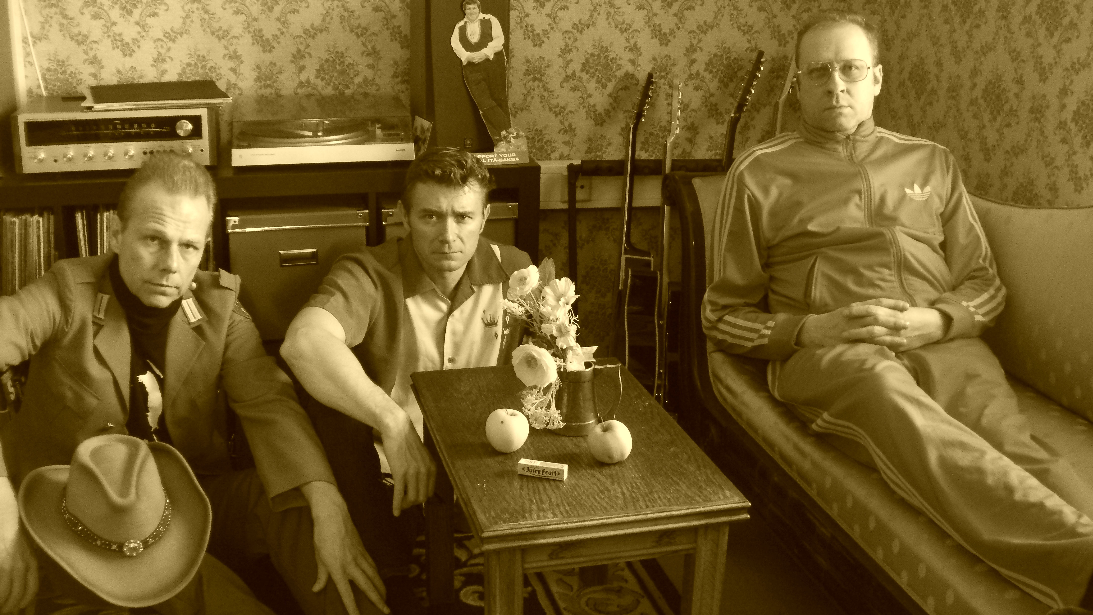 Itä-Saksa 2017